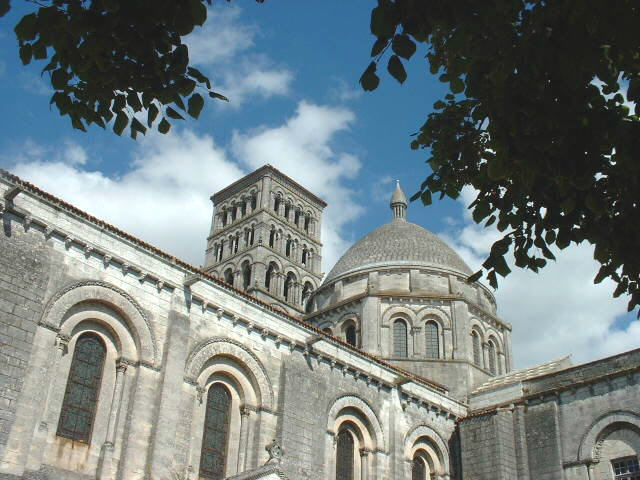 Cathédrale Saint-Pierre ,vue latérale.